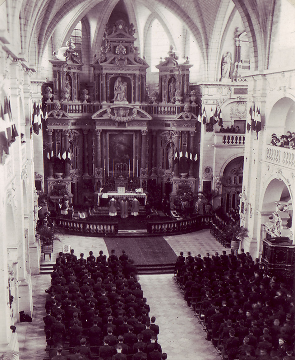 Messe dans l'église Saint-Louis du Prytanée National Militaire dans les années cinquante.